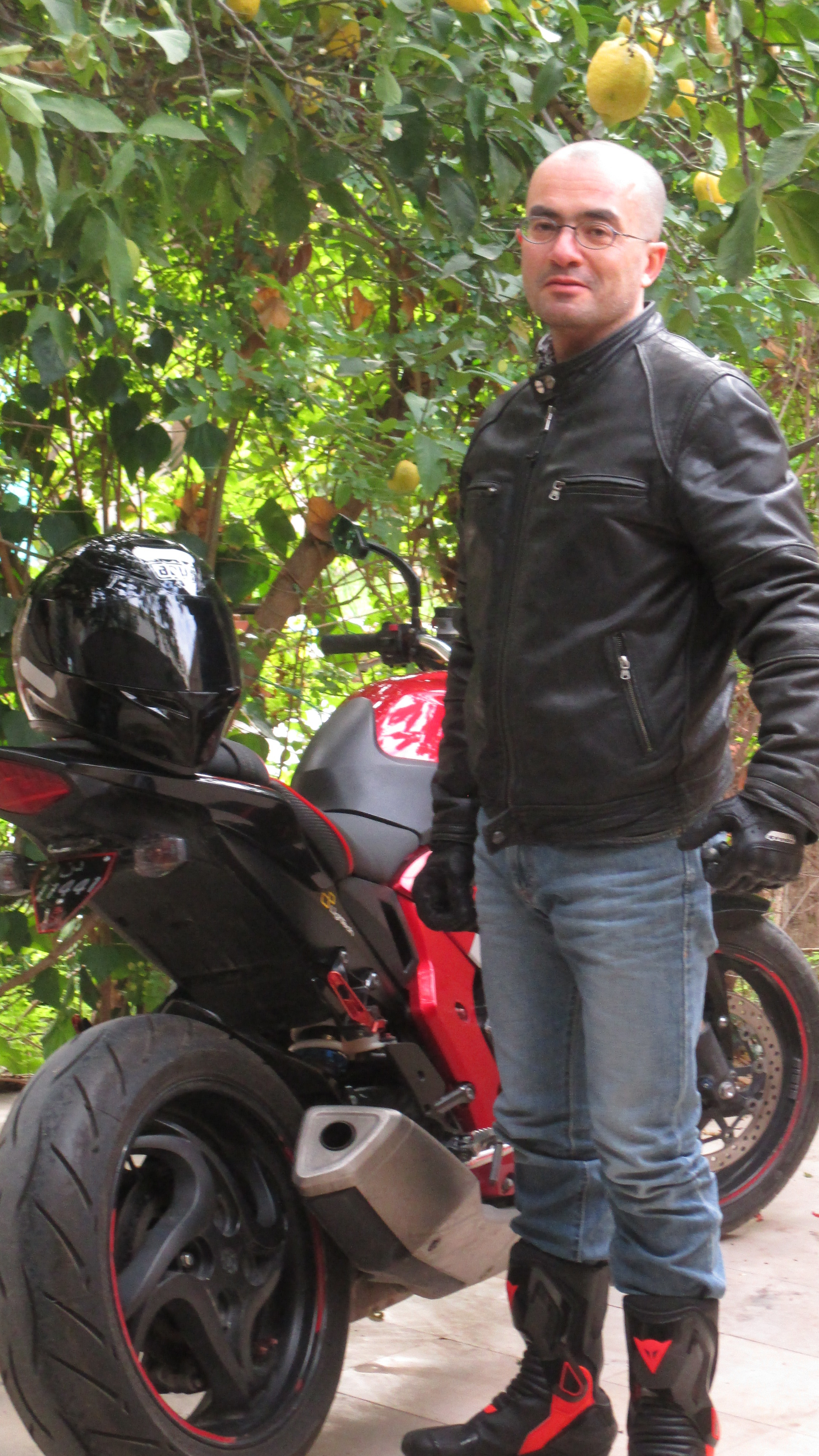 Sofiane Bouhdiba en exploration